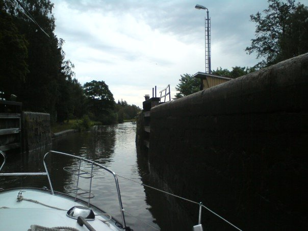 Bråttom sluss 2009